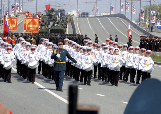 День Победы около 2 тыс. военнослужащих и 17 единиц военной техники прошли парадным строем по площади Тысячелетия в Казани.